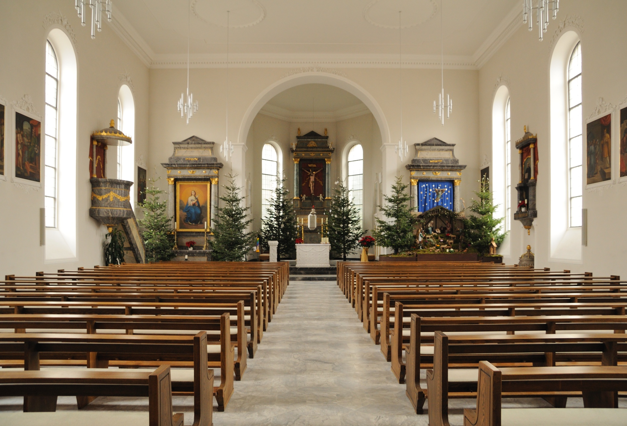 Fridolinskirche in Lörrach Stetten: Innenansicht in Richtung des Chors